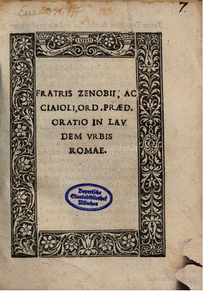 Oratio In Laudem Urbis Romae, 1518, Zanobi Acciaiuolli (1461-1519)